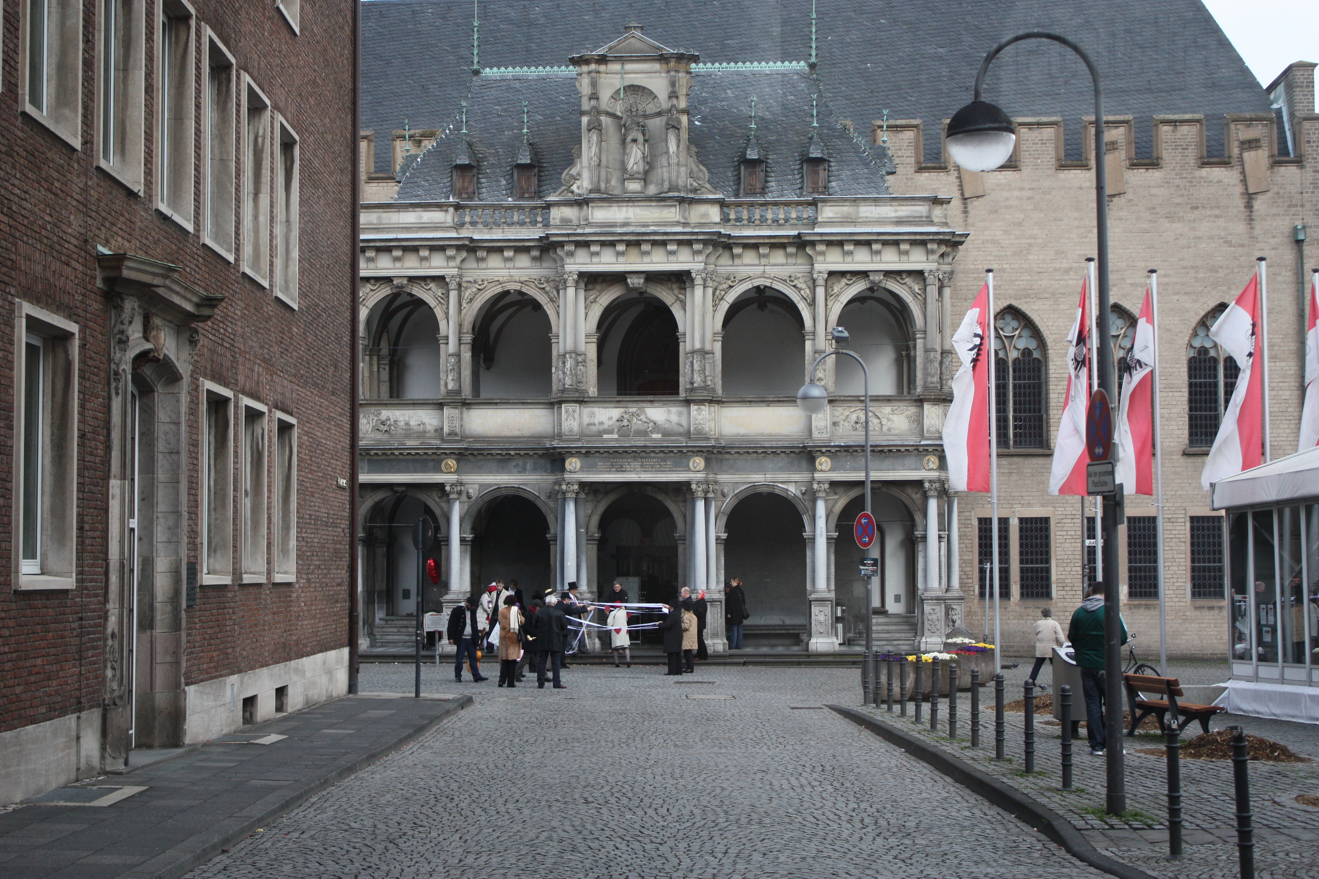 Köln, historisches Rathaus